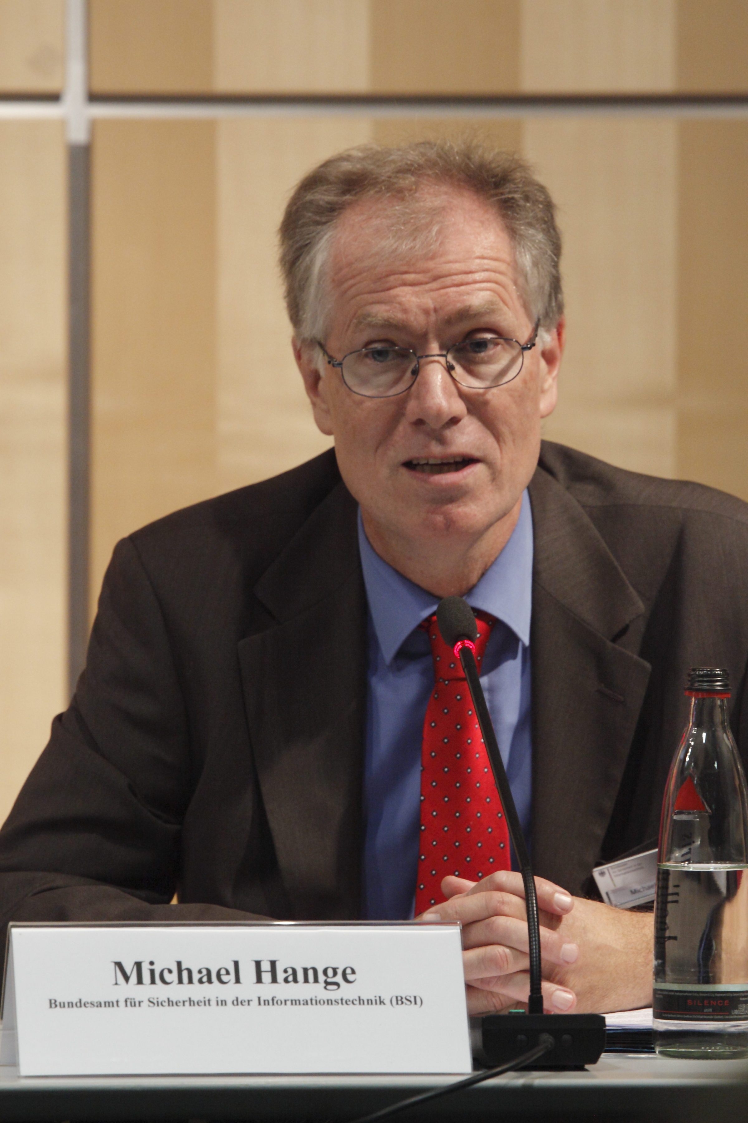 Michael Hange (Präsident, Bundesamt für Sicherheit in der Informationstechnik) auf der Fachmesse it-sa in Nürnberg Foto: Norbert Luckhardt